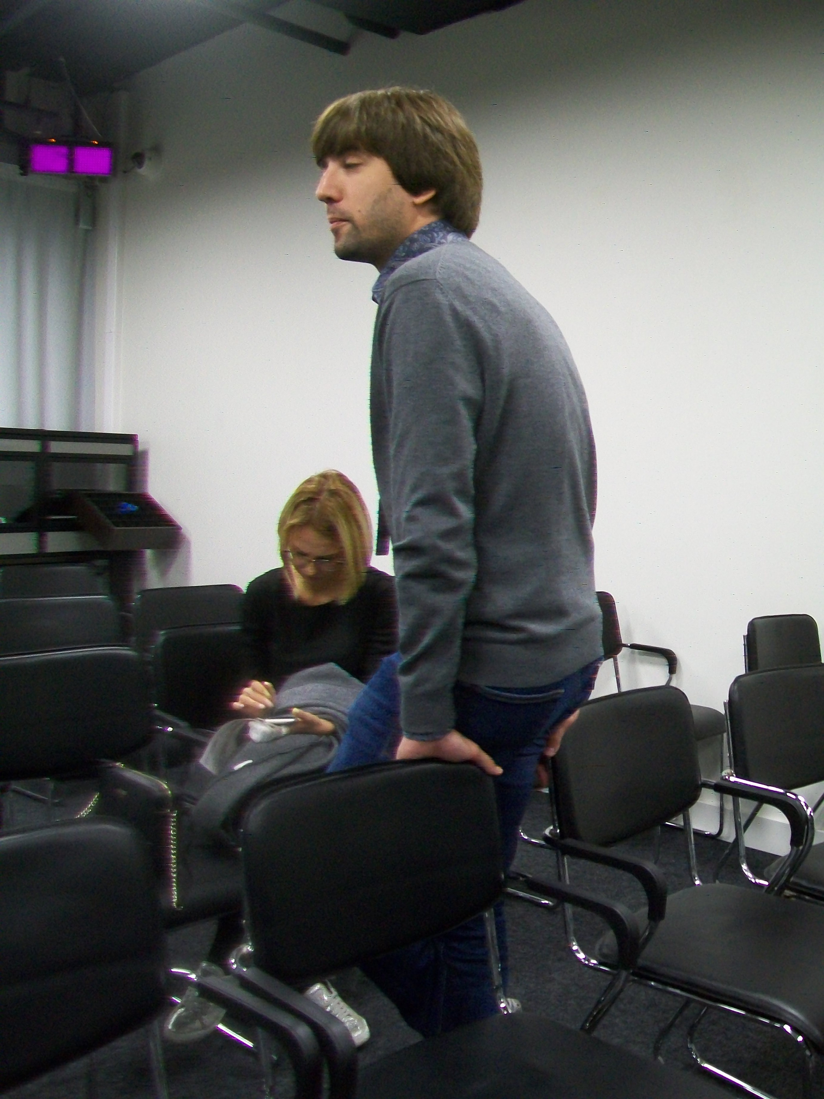 Режиссер Александр Варлей, сын Натальи Варлей после показа своего фильма "Тебе на "С"". Ельцин-центр, Екатеринбург, 2 сентября 2017 года